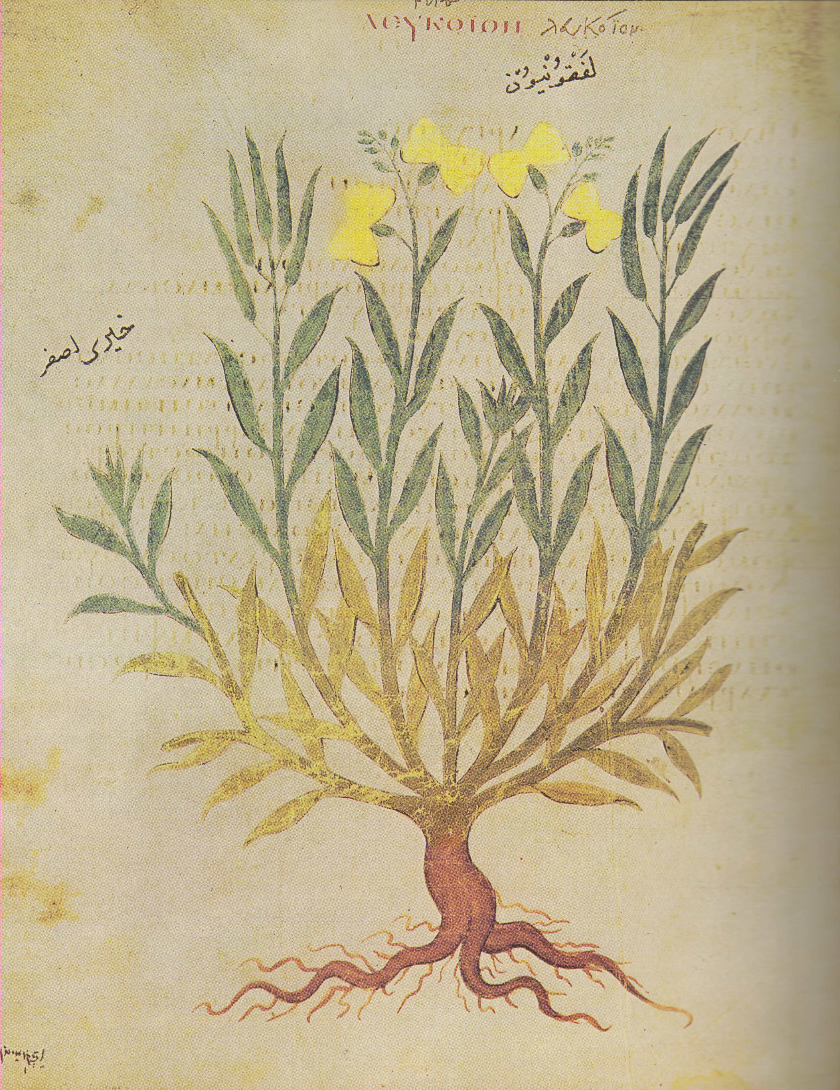 Abbildung von »Leukoion« (Erysimum cheiri?)